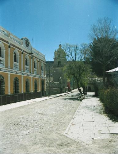 Plaza de Arma at Salinas de Garcí Mendoza